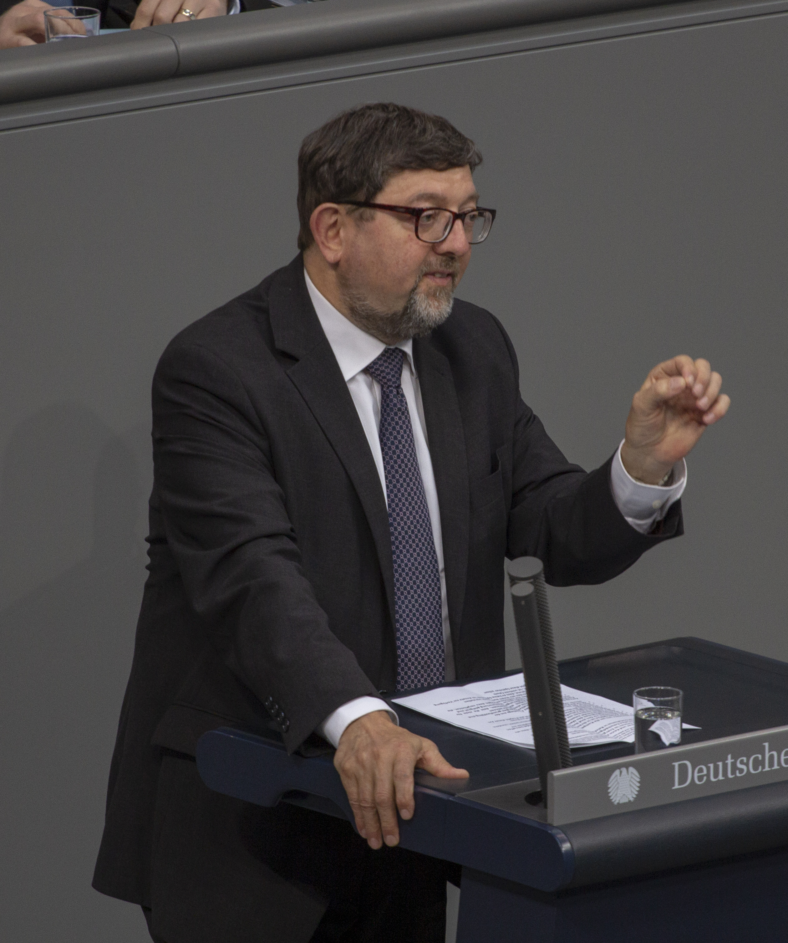 Andreas Lämmel Mitglied des Deutschen Bundestages während einer Plenarsitzung am 9. Mai 2019 in Berlin.